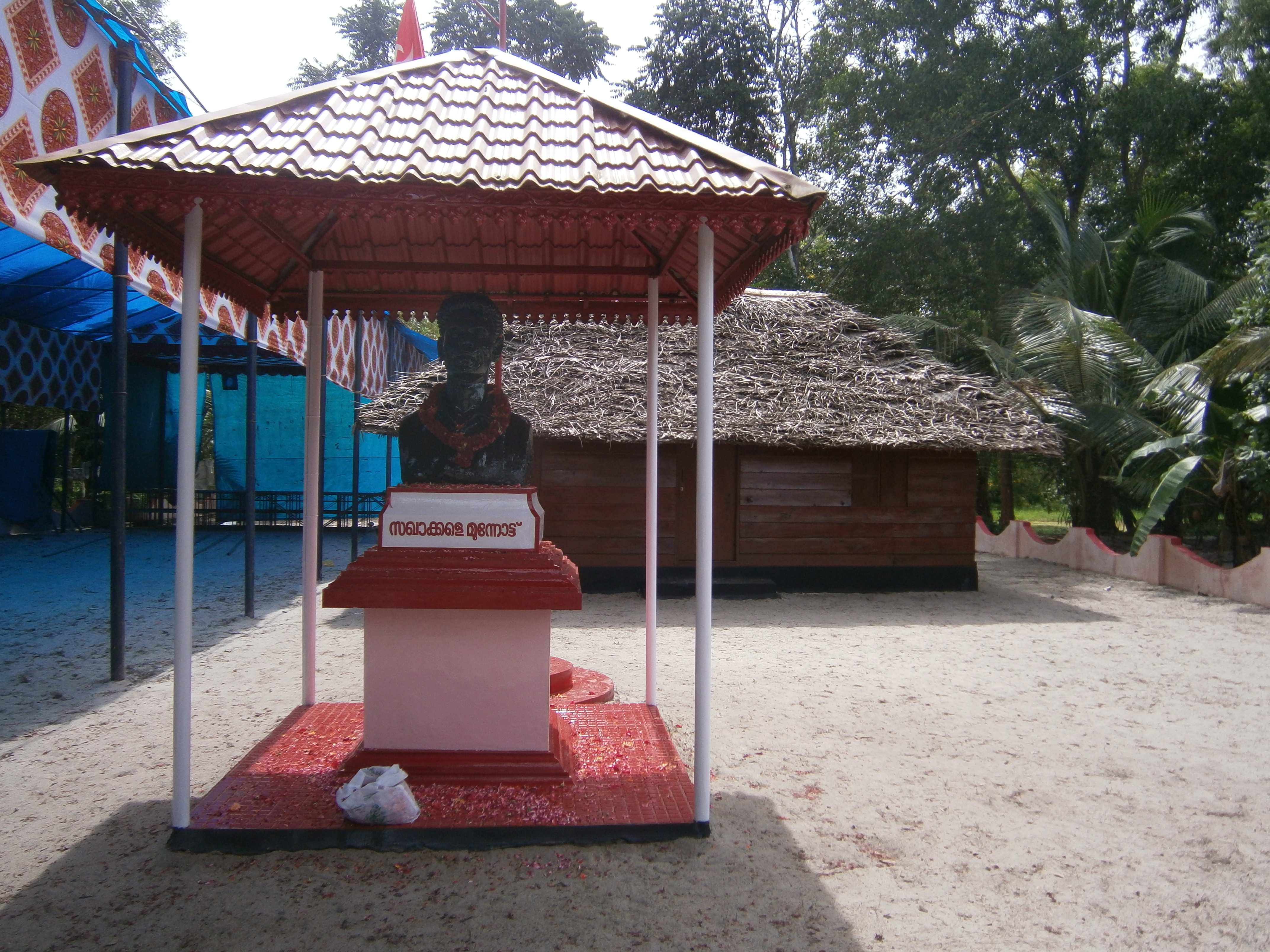 ചെല്ലിക്കണ്ടത്തില്‍ വീട് - പി. കൃഷ്ണപിള്ള സ്മാരകം